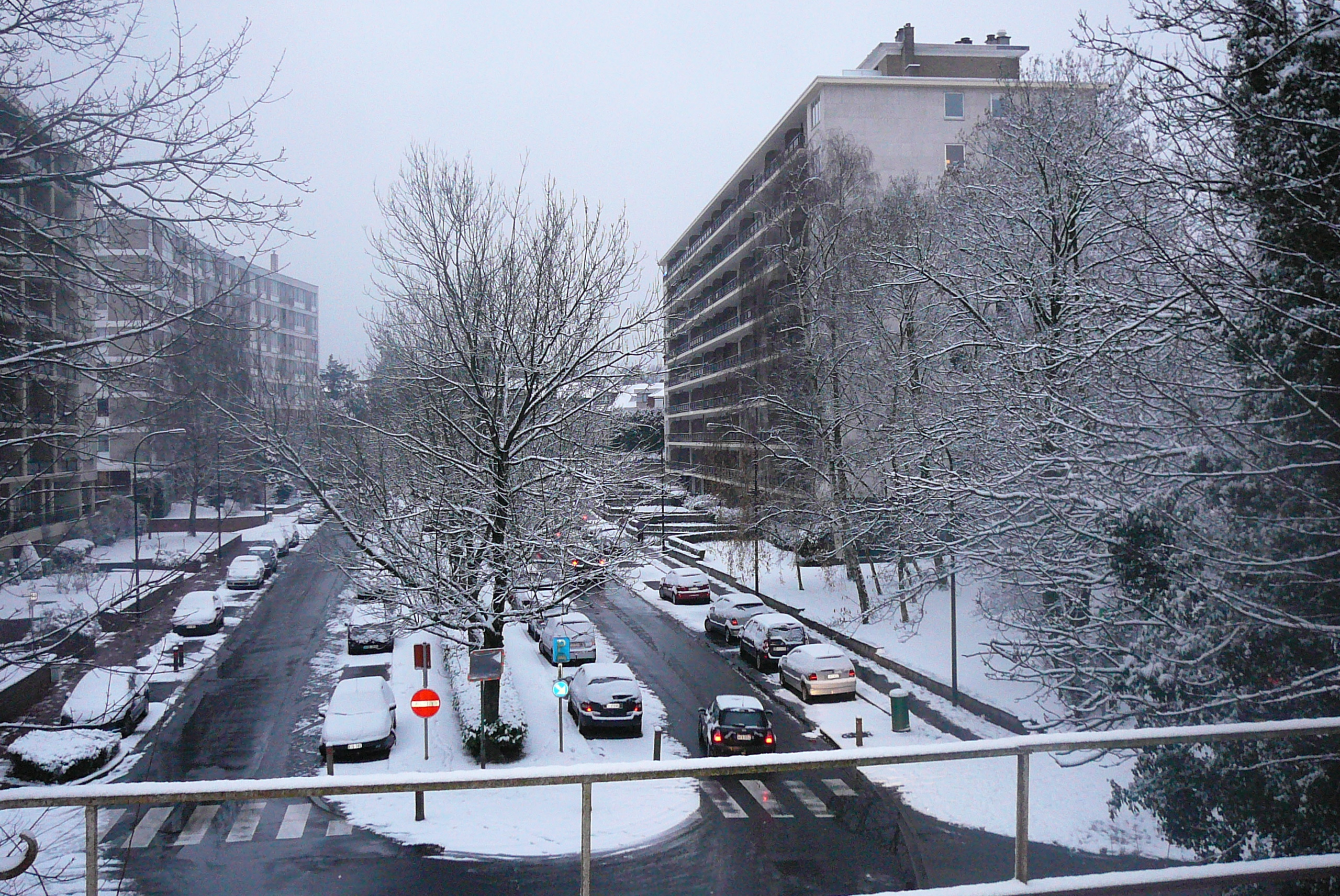 Tronçon du Val des Seigneurs, sous la neige, à Woluwe-Saint-Pierre, Région bruxelloise, Belgique